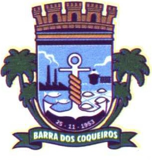 brasão município Barra dos Coqueiros, Sergipe